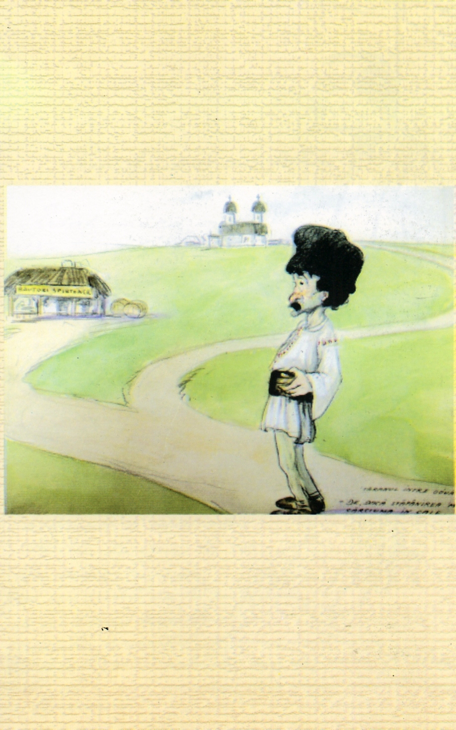 De, dacă stăpânirea îmi pune cârciuma în cale... (Din mapa-album inedit: Caricaturi, Repausul duminical la Senat, martie 1908